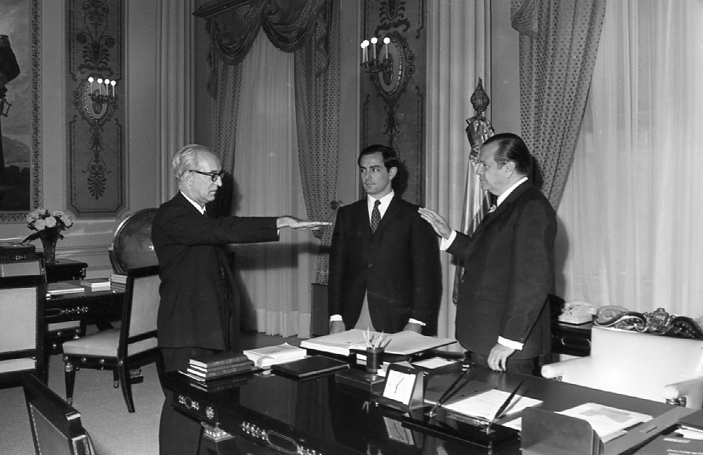 El doctor Edgar Sanabria al momento de ser juramentado por Rafael Caldera en el cargo de comisionado especial de la presidencia.